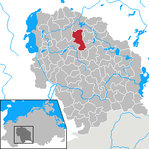 Kobrow in Mecklenburg-Vorpommern - District Parchim